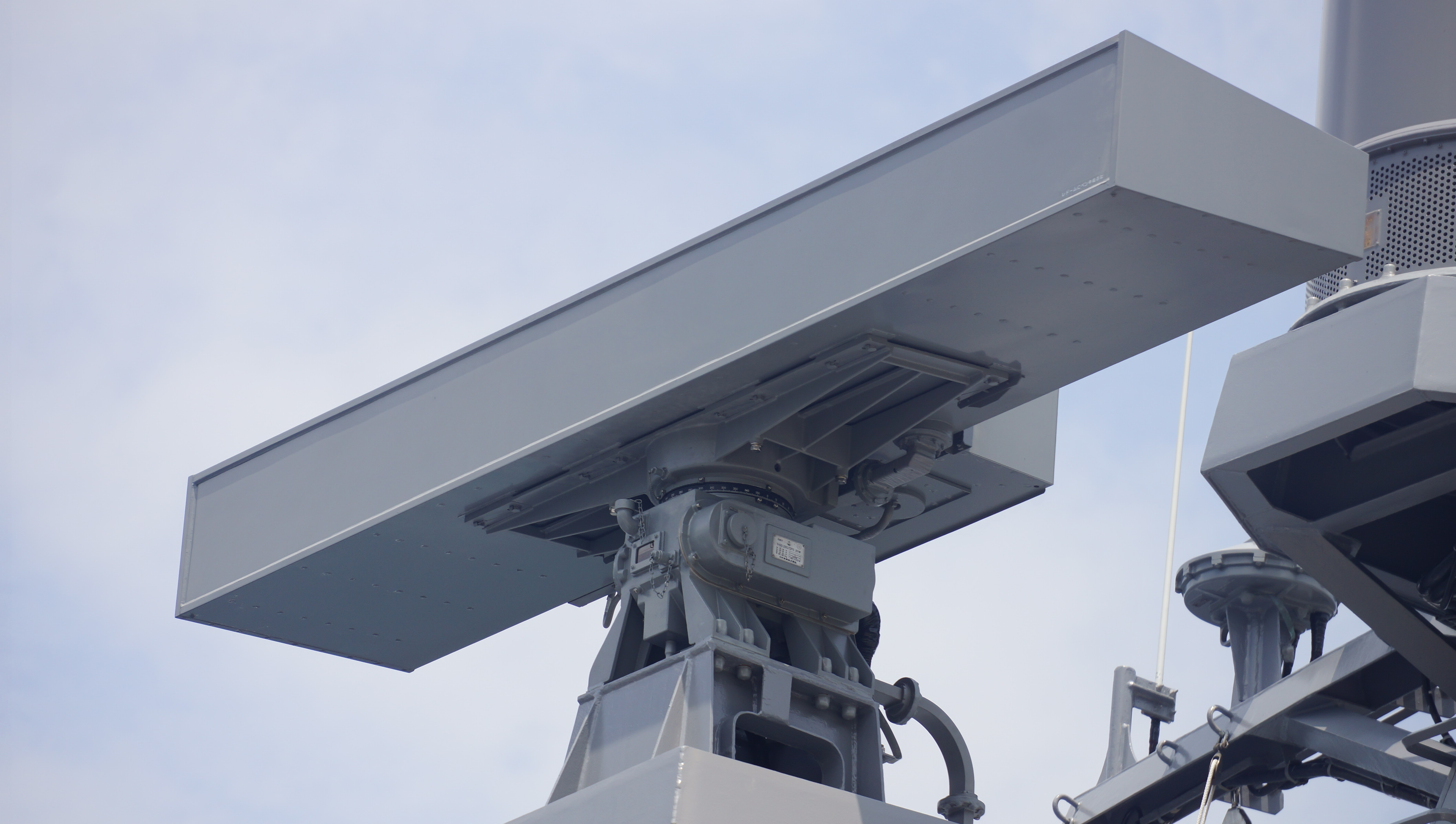 海上自衛隊 ミサイル艇はやぶさ（PG-824） OPS-18-3対水上レーダー。 14年7月27日 舞鶴基地にて。